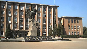 该图片由本人拍摄与2004年10月3日。 辽宁工程技术大学主教学楼,建于1978年7月。 前面的为大鹰雕塑，其典故出自于《韩非子·喻老》中“三年不翅，将以长羽翼；不飞不鸣，将以观民则。虽无飞，飞必冲天；虽无鸣，鸣必惊人。” 下面的牌匾“诚朴求是 博学笃行”为该校校训。